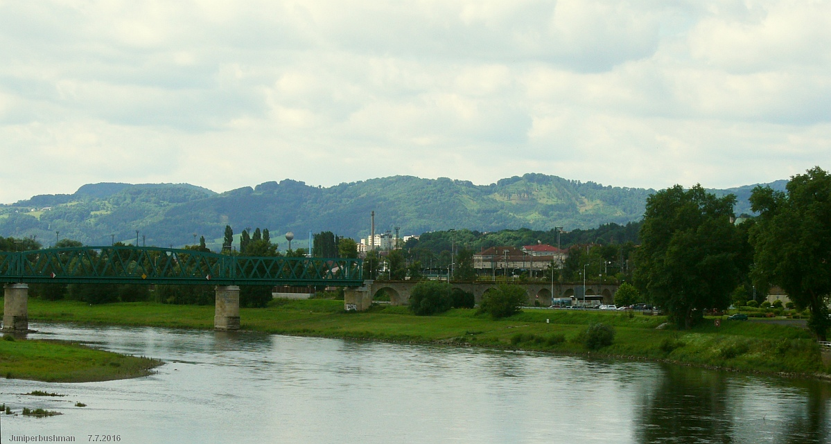 Panorama Sedmihoří z Tyršova mostu v Děčíně.